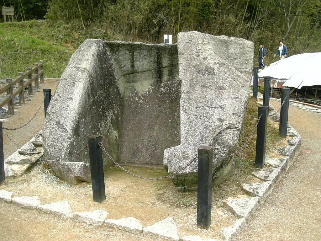 明日香村の鬼の雪隠